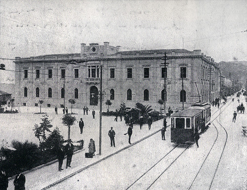 Reggio Calabria, Piazza Italia e Palazzo San Giorgio.